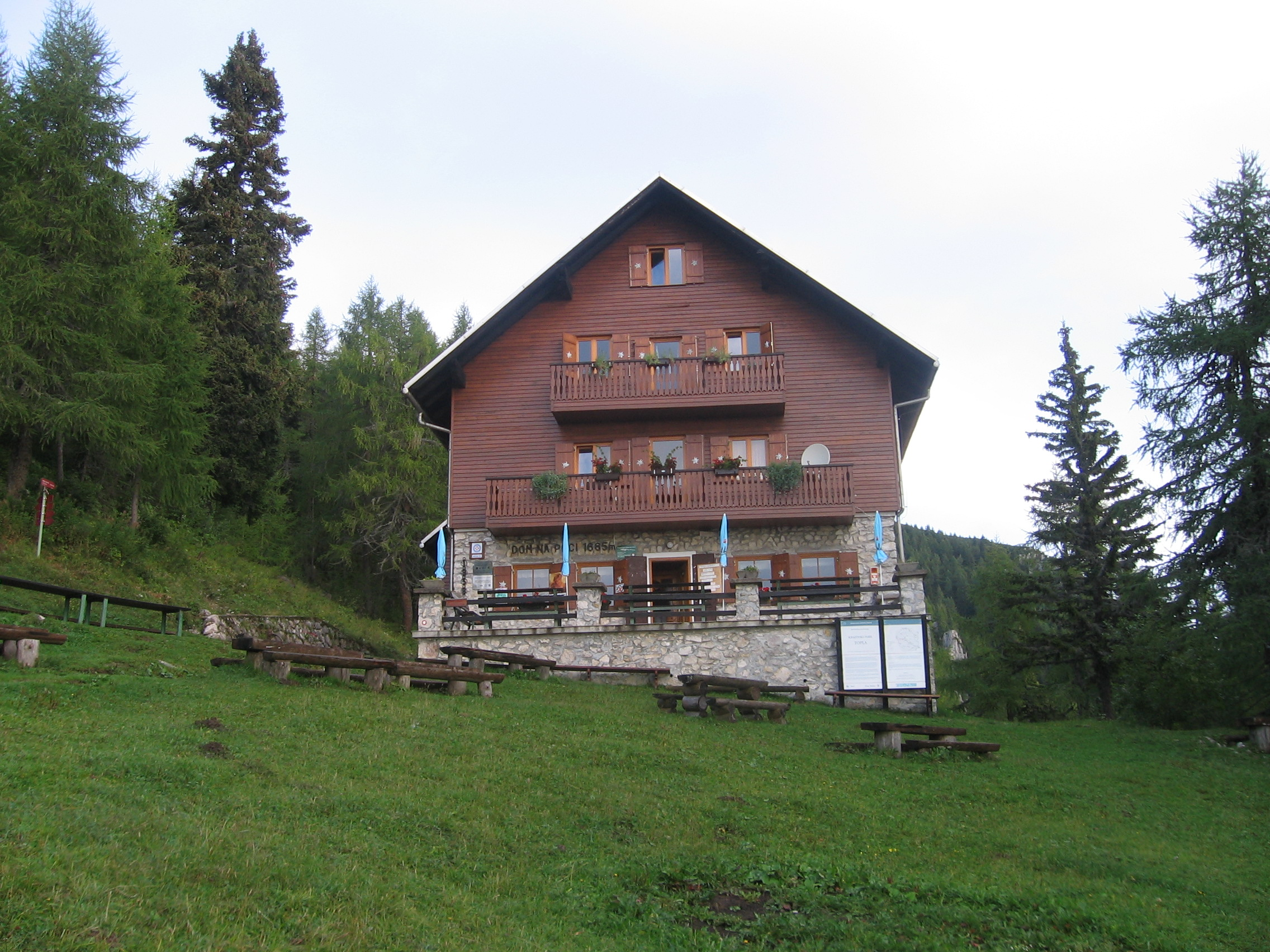 Dom na Peci / Hut on Mt. Peca, Karavanke